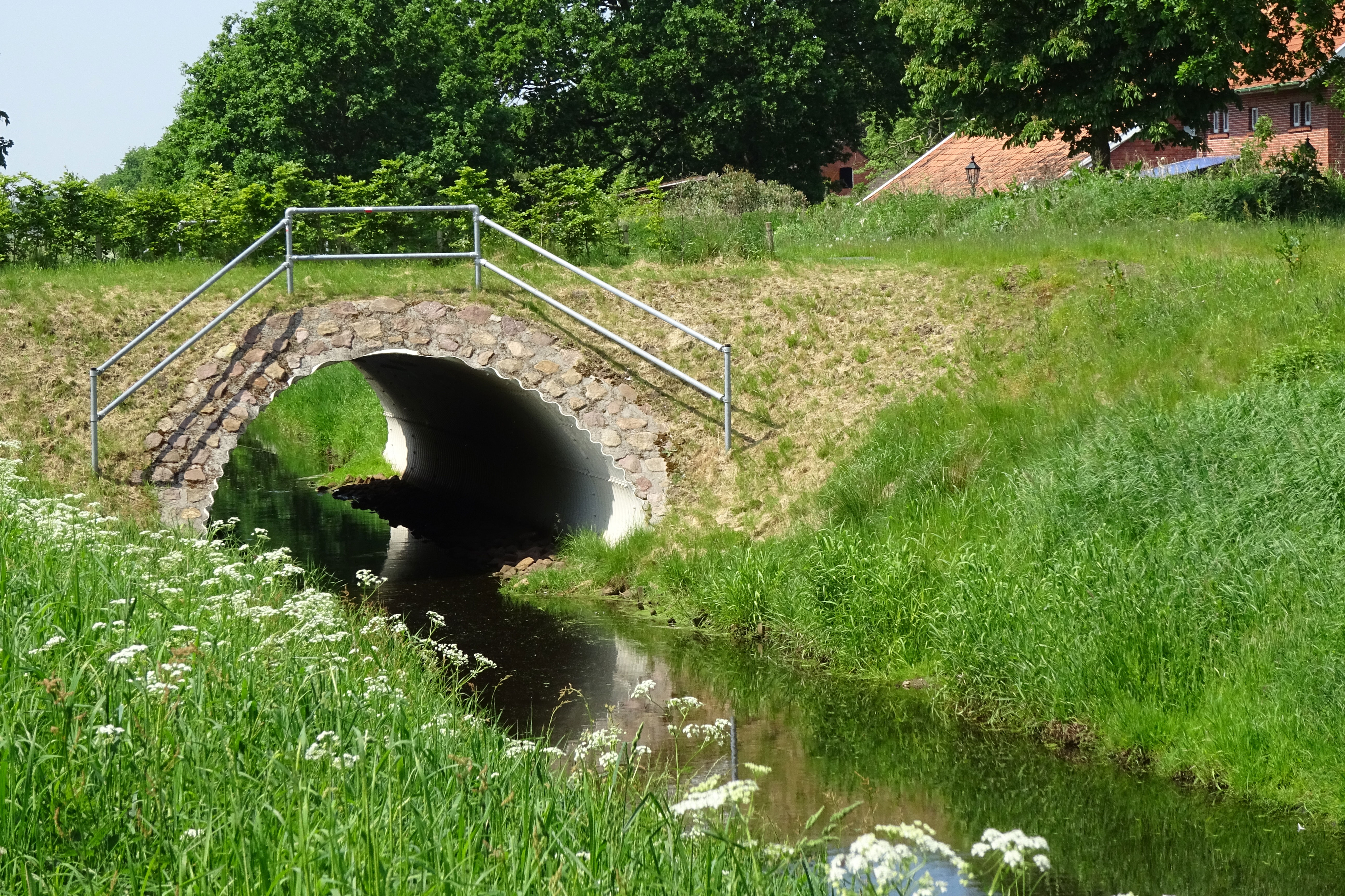 Brualer Schloot, kruispunt Hinterster Wiekweg, Osseweg, Johannesstraße